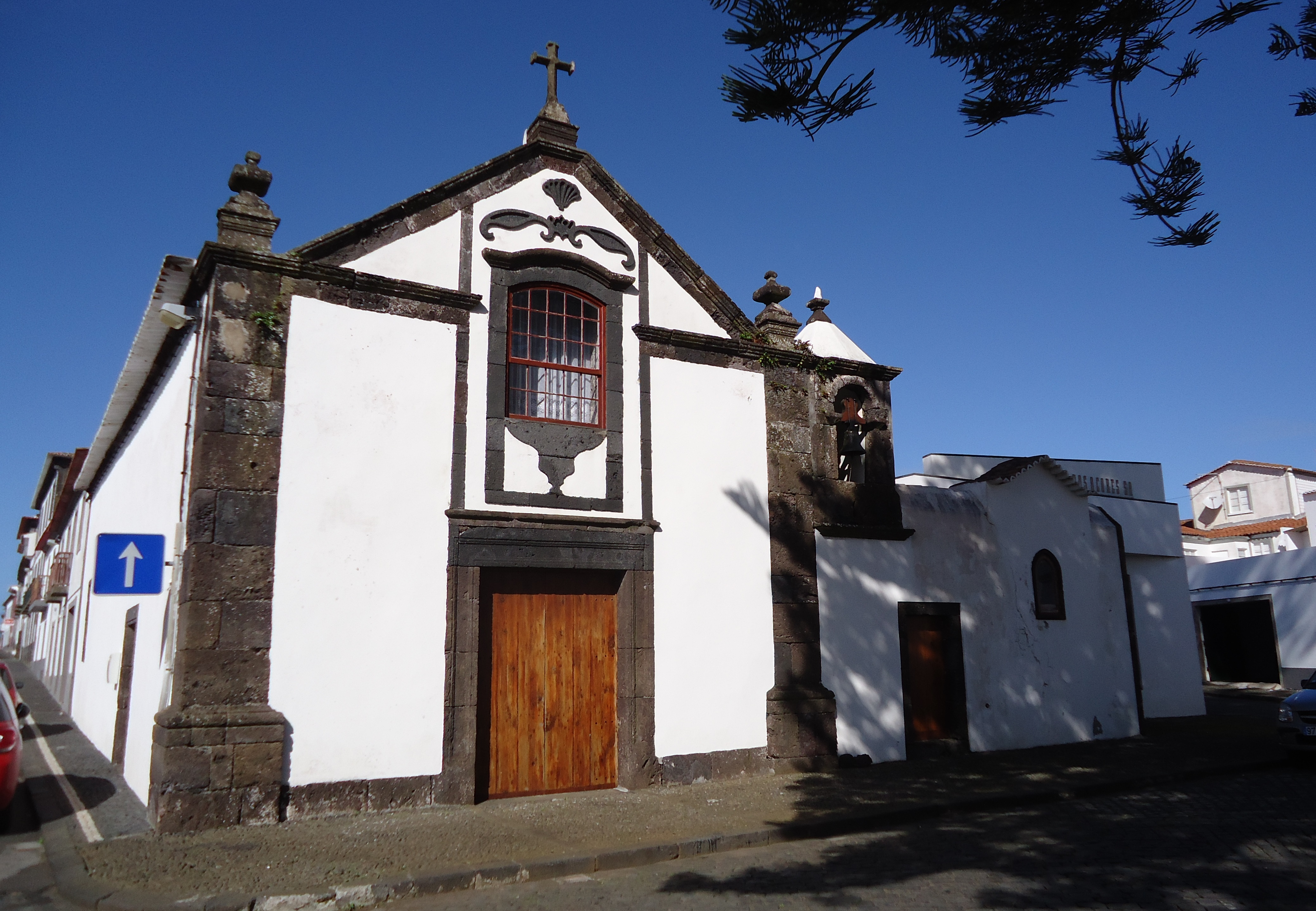 Ermida de Santo António, centro histórico de Santa Cruz da Graciosa, ilha Graciosa, Açores.